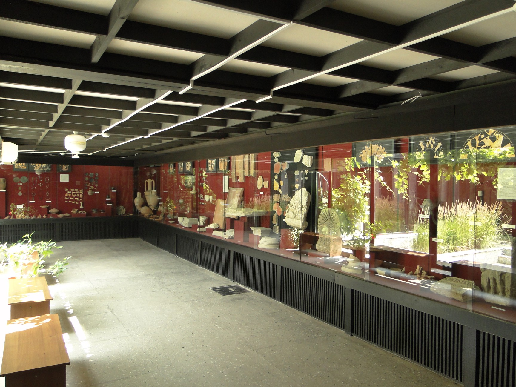 Один из залов Таманского археологического музея